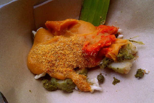 Nasi rooma